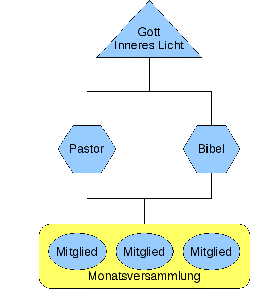 Schematische Darstellung der Gemeideleitung und Entscheidungsfindung im Quakertum (Evangelikaler Flügel).